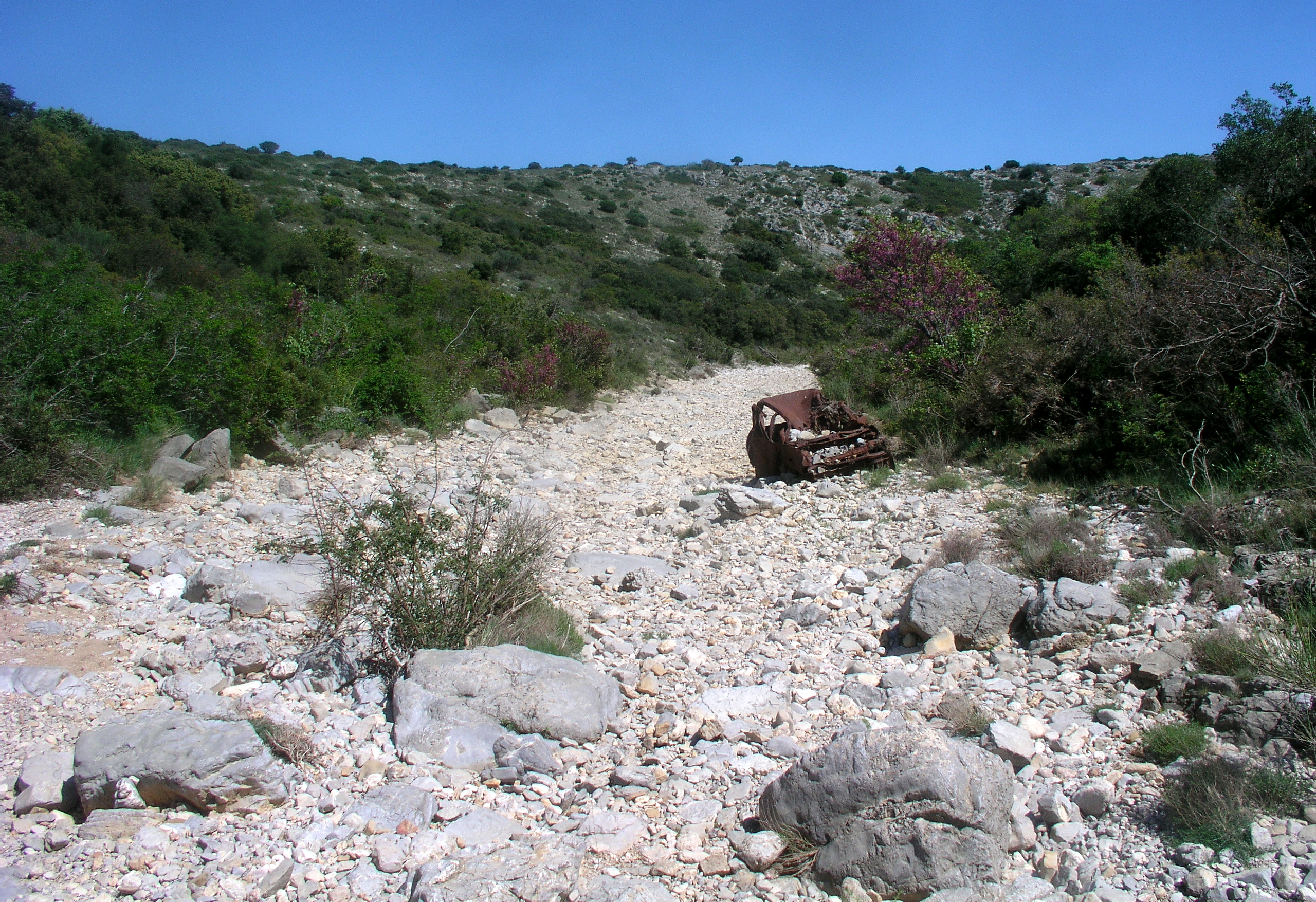 Le Coulazou en amont du puits de l'Aven (Cournonterral)